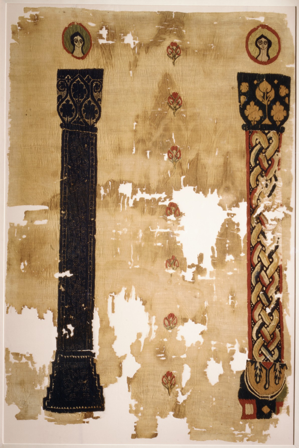 Hanging; Textiles